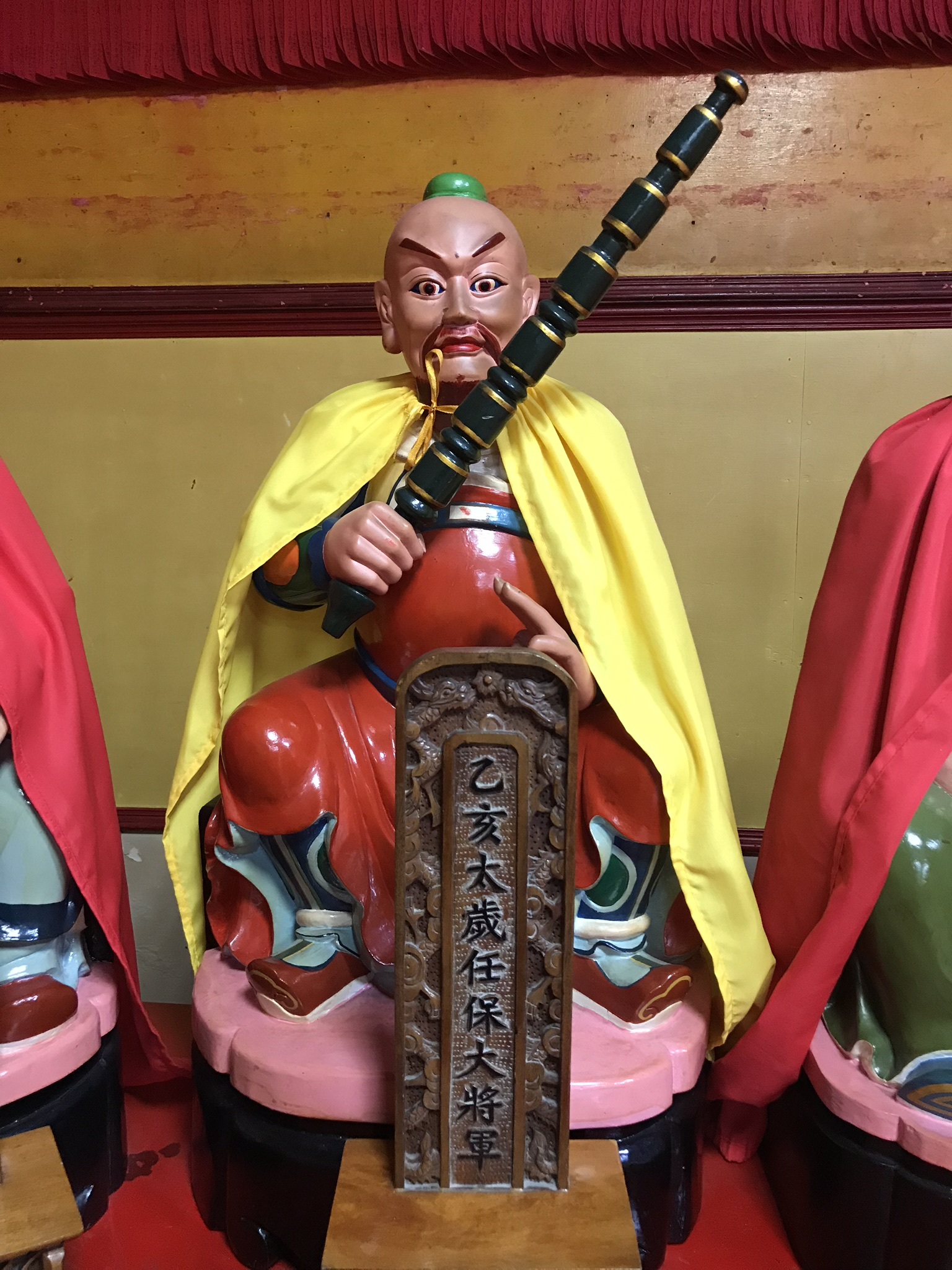 乙亥太歲任保大將軍神像